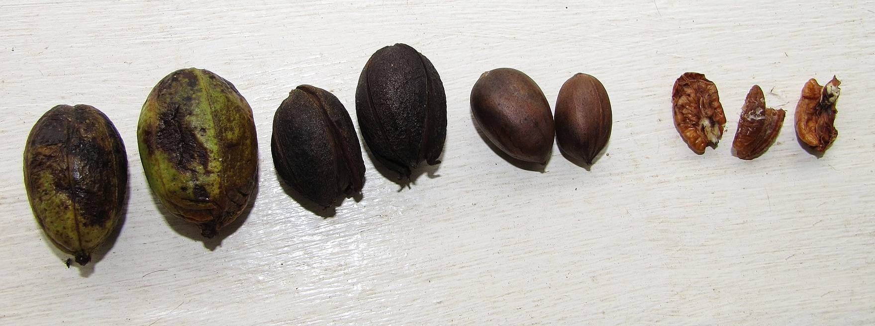 Le terme "noix de pécan" s'applique dans la langue commune suivant le contexte, aussi bien au fruit du pacanier entier, tel qu'il est sur l'arbre, au fruit débarrassé de son écale, ou à l'amande (la graine) comestible